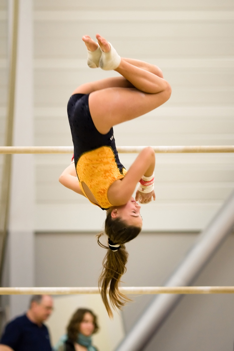 Figure on uneven bars.